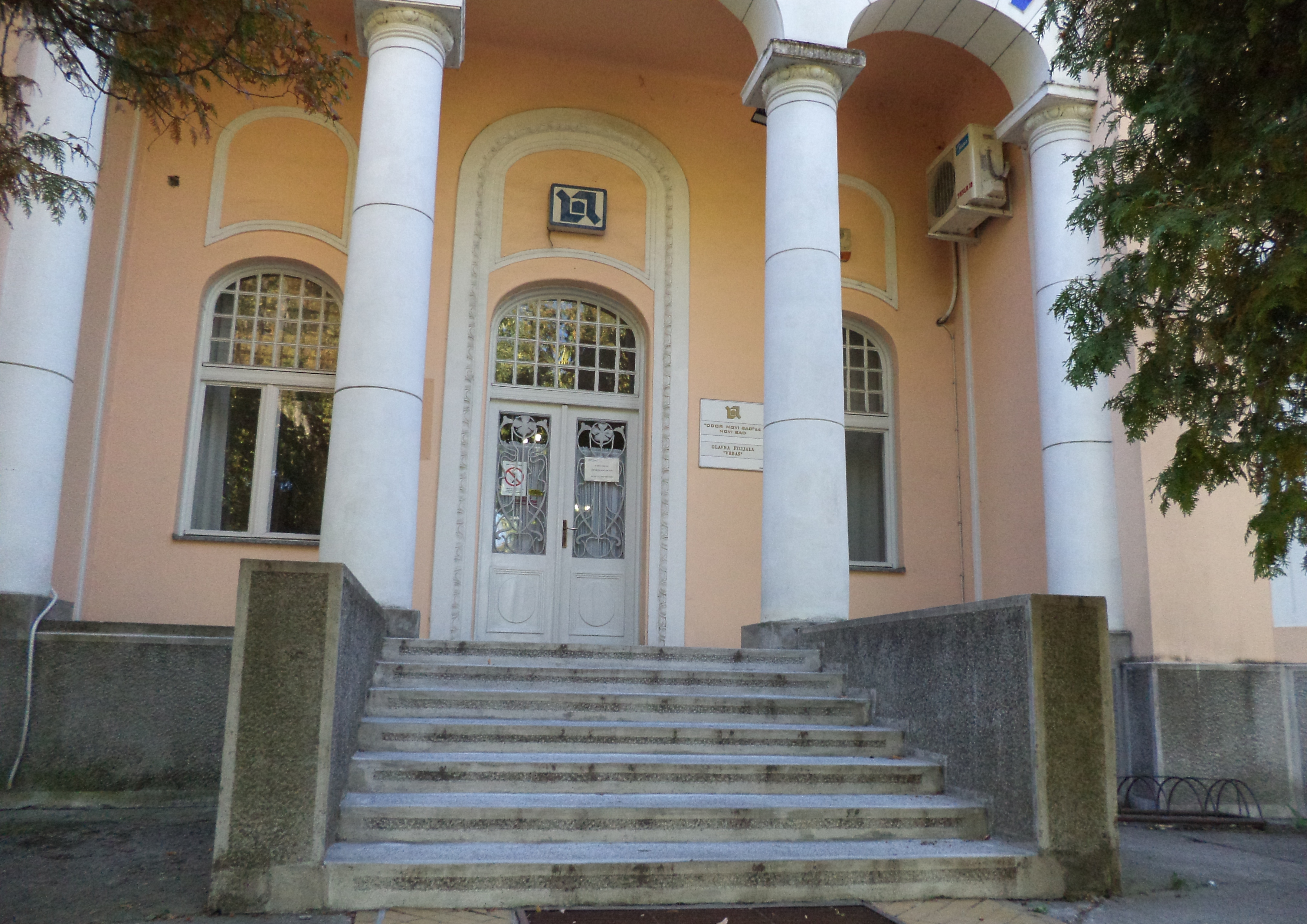 Зграда у Врбасу, улица Маршала Тита 42